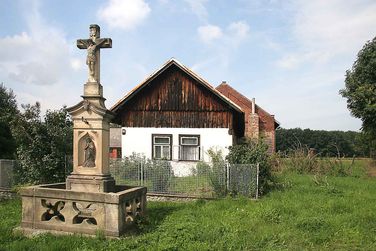 Nerošov u Nechanic - boží muka, District Hradec Králové, Czech Republic Autor: Prazak date: 26. 8. 2006